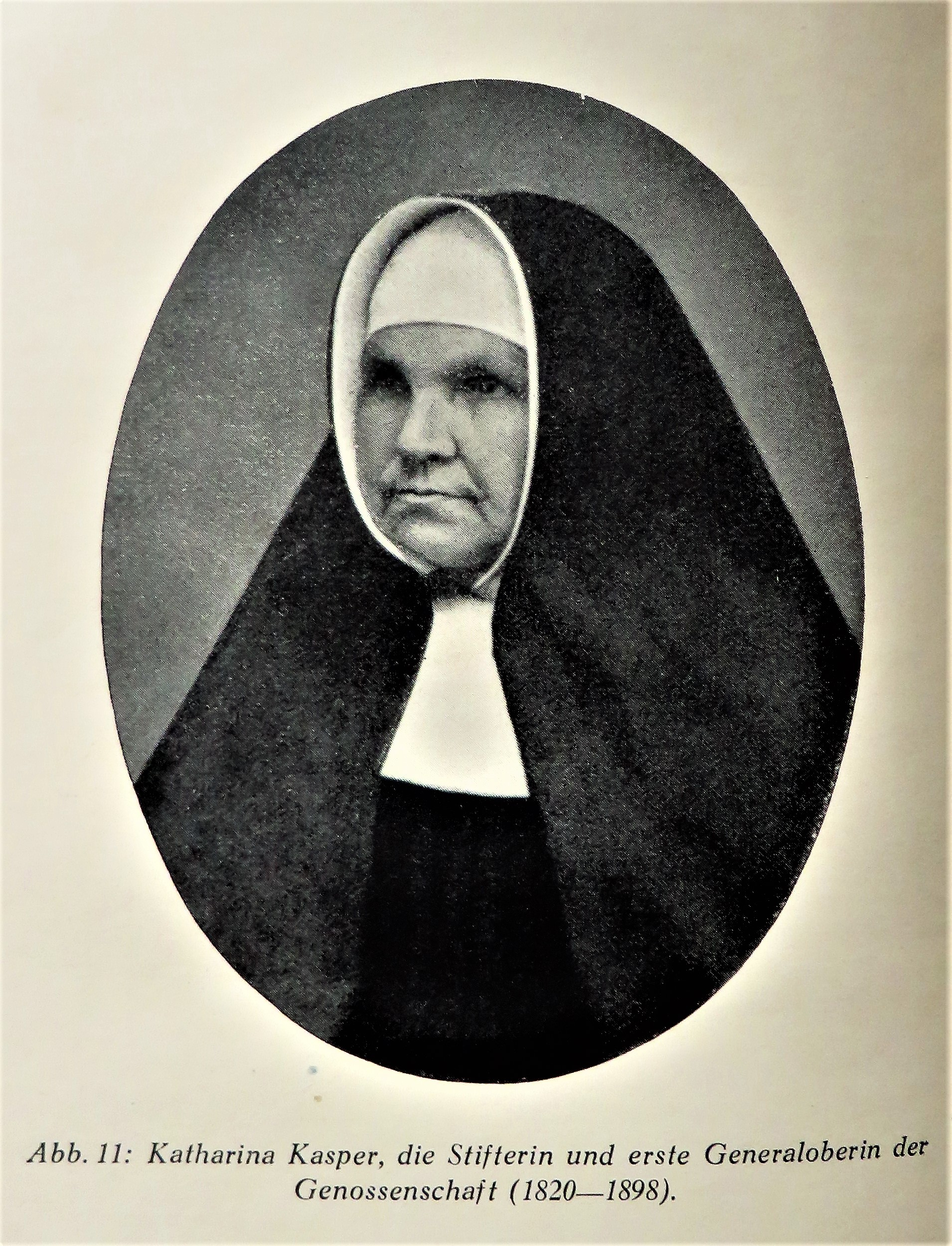 Katharina Kasper, die Stifterin und erste Generaloberin der Genossenschaft ADJC